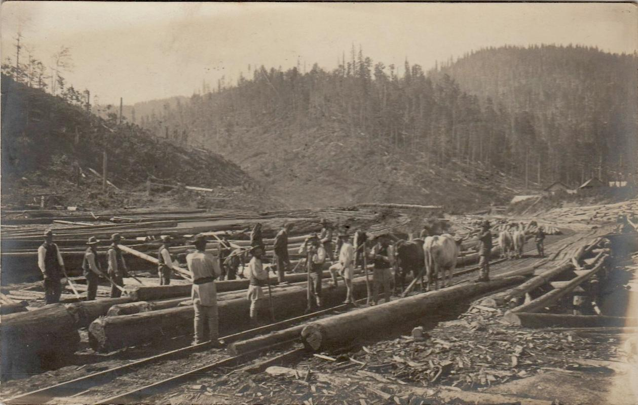 Platforma fabricii de cherestea de la Tarcău